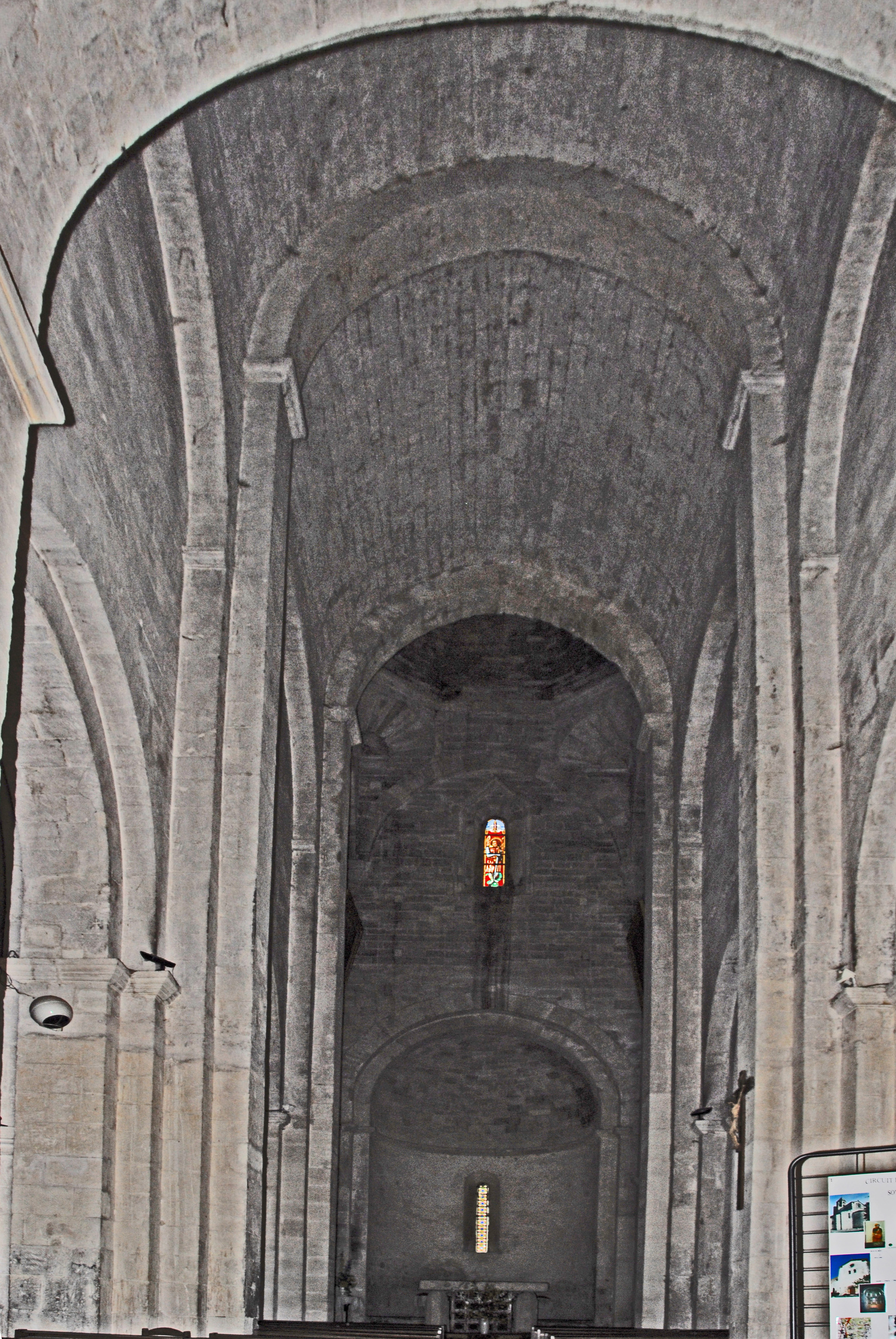 St-Michel de La Garde- Adhémar. Mittelschiff aus Narthex